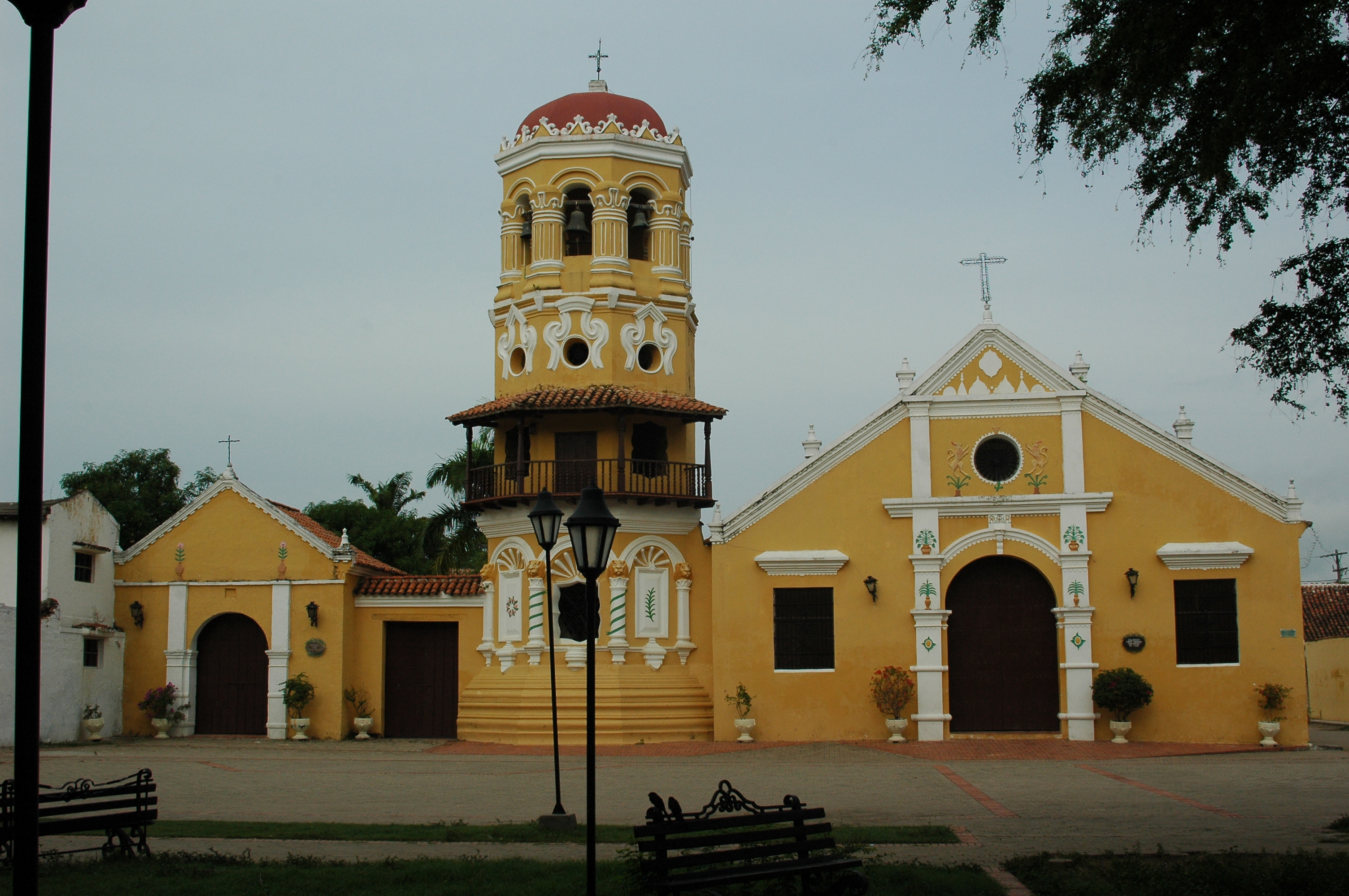 Santa Cruz de Mompox Chiesa di Santa Barbara, con il caratteristico campanile sul balcone